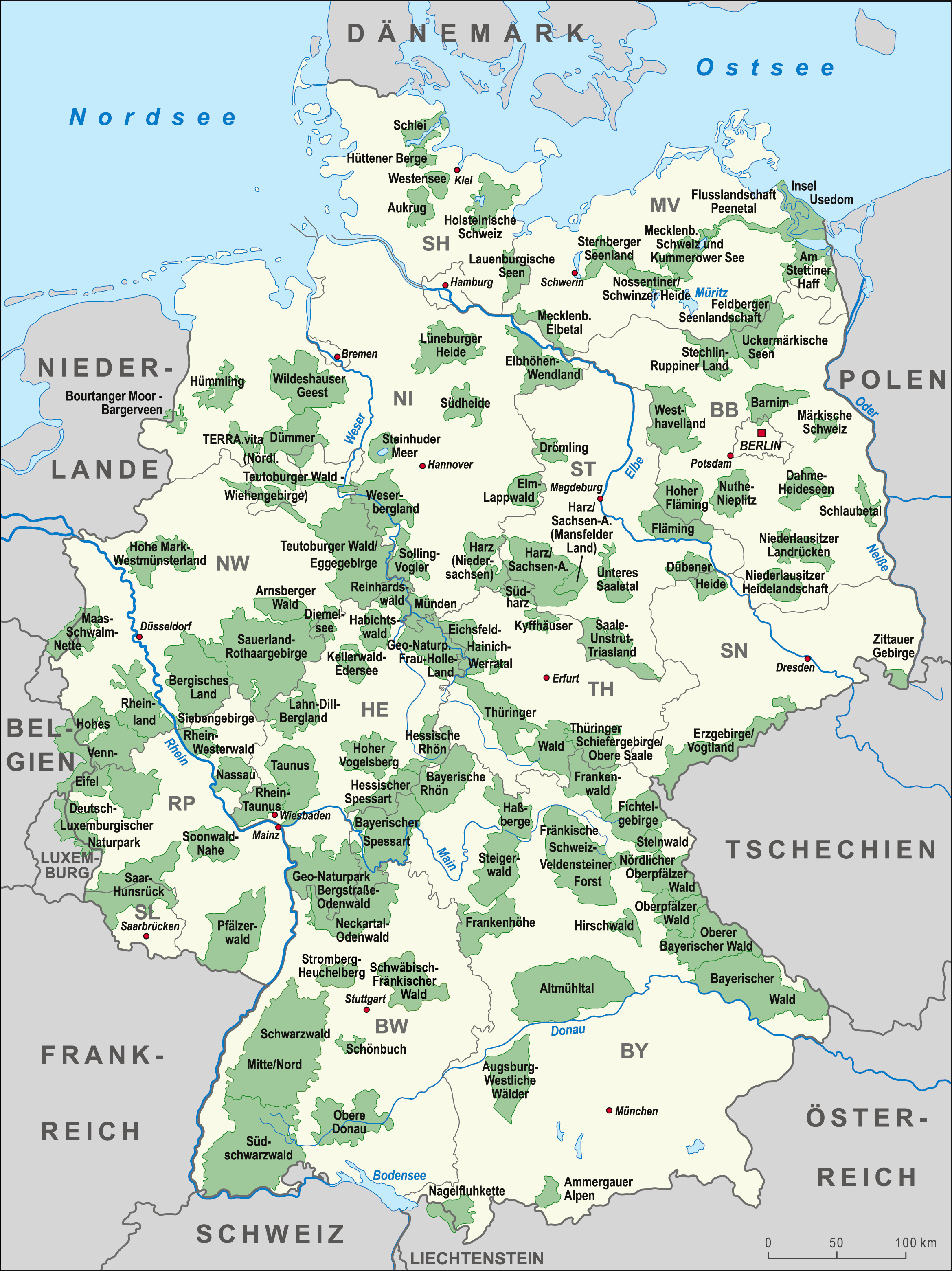 Karte der Naturparks/Naturparke in Deutschland